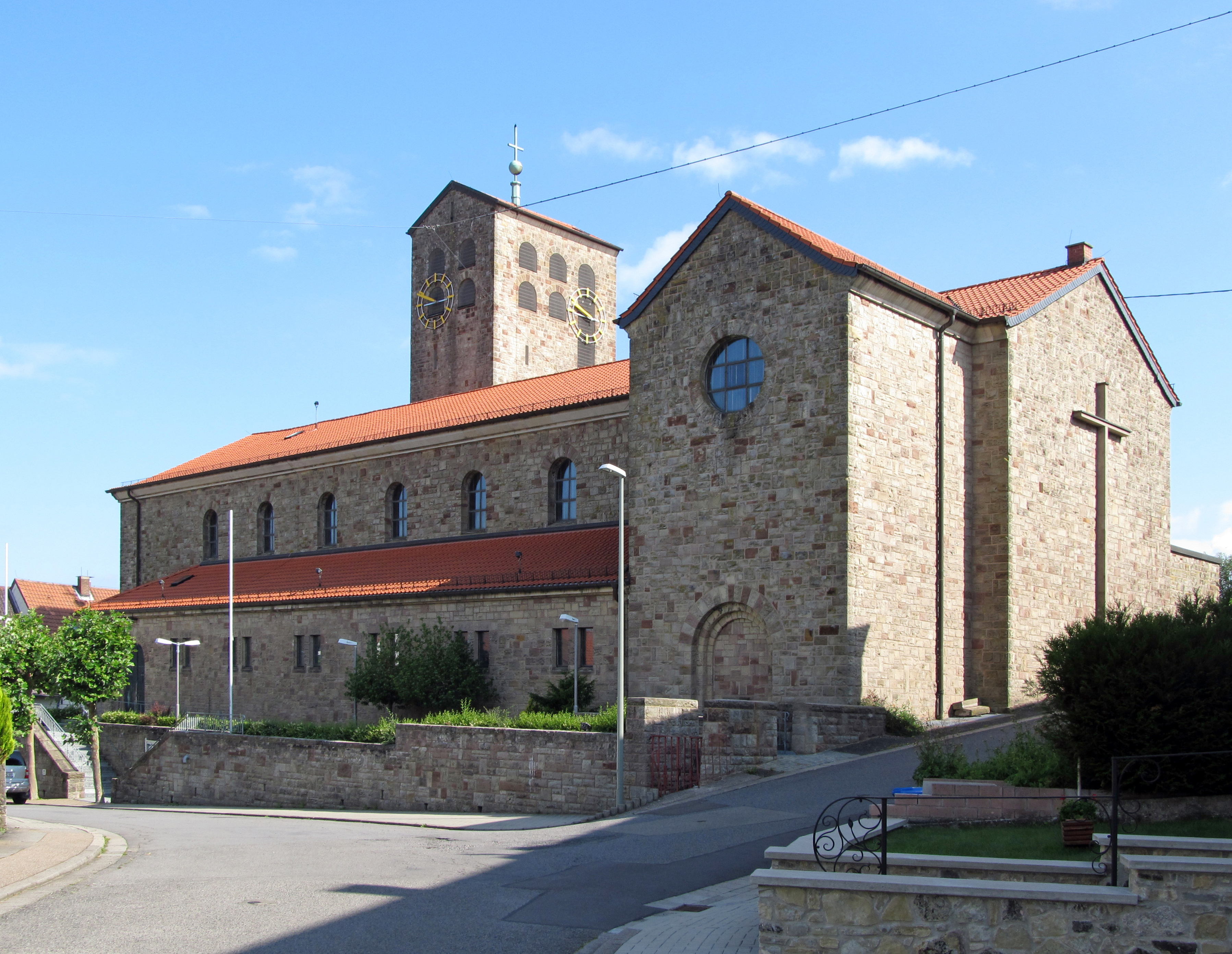 Die katholische Pfarrkirche St. Mauritius in Ormesheim, Mandelbachtal, Saarland